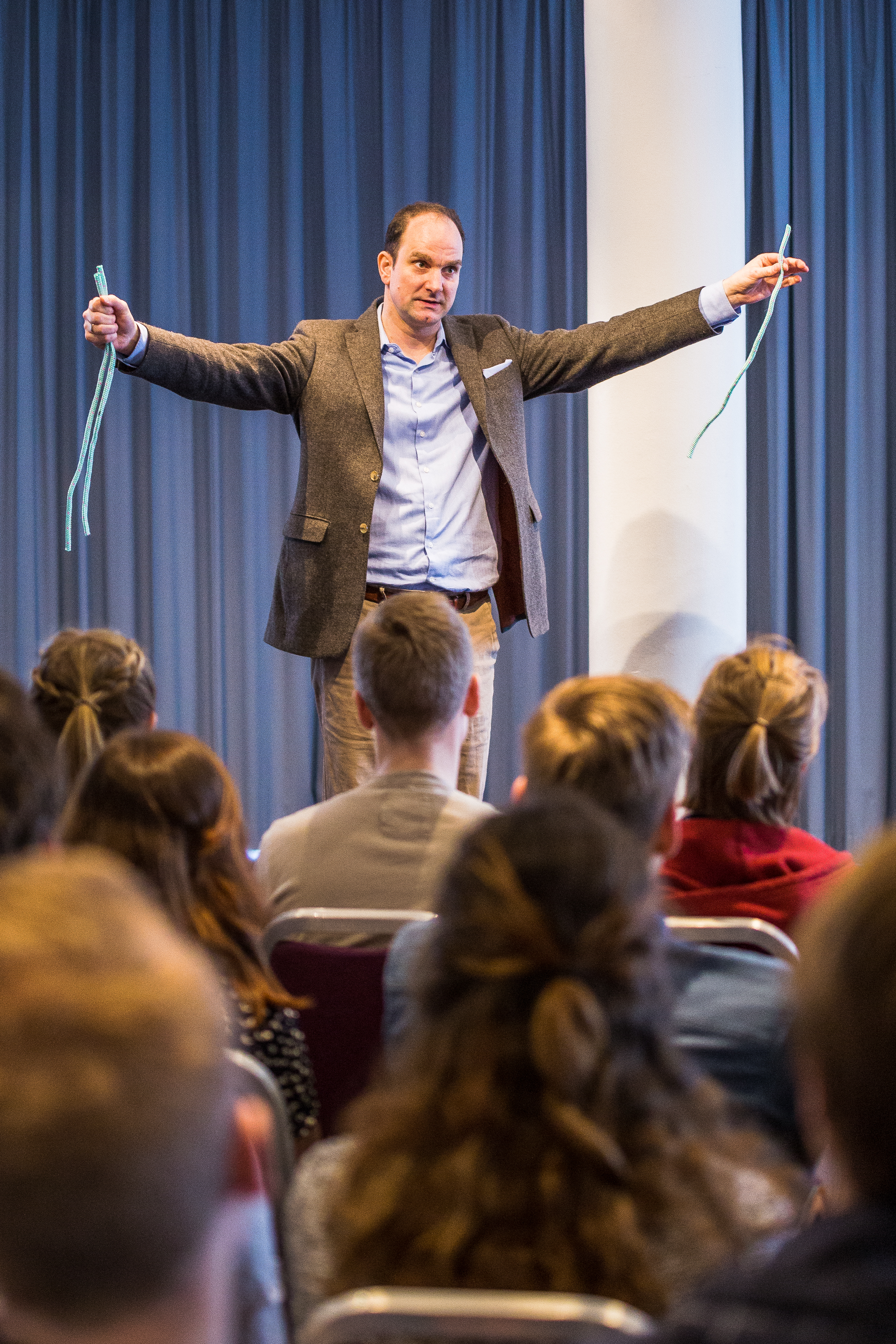 Der Redner und Business Speaker auf dem Jugend gegen AIDS e.V. Kongress in Hamburg im HolidayInn.